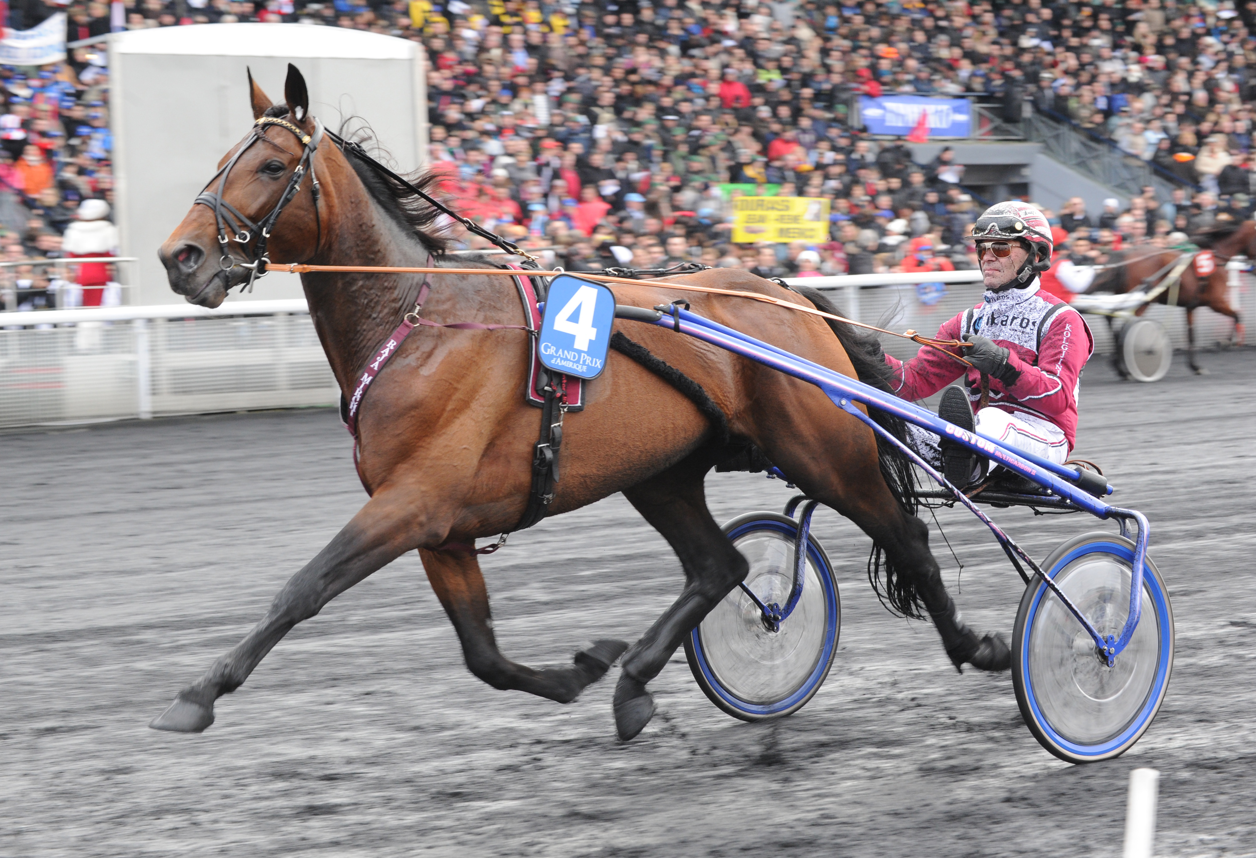 Kusken Lutfi Kolgjini och travaren Raja Mirchi deltar i Grand Prix d'Amérique 2013.